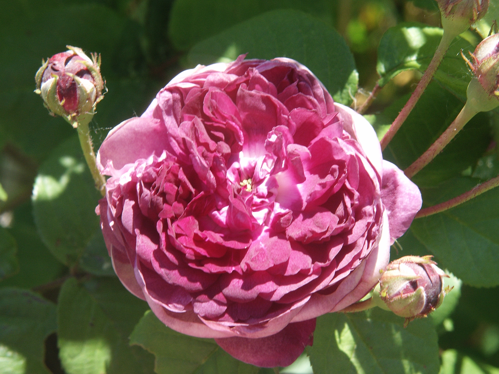 Rosa gallica 'Cardinal de Richelieu'